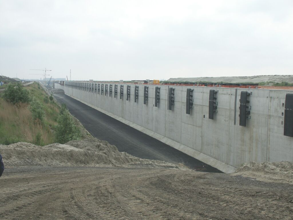 Kaaimuur Deurganckdok. Eigen foto, 3/6/2004.